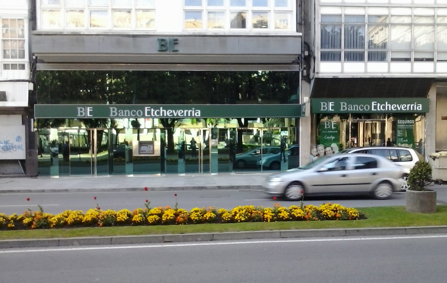 Oficina Banco Etcheverría na Coruña Galiza Spain